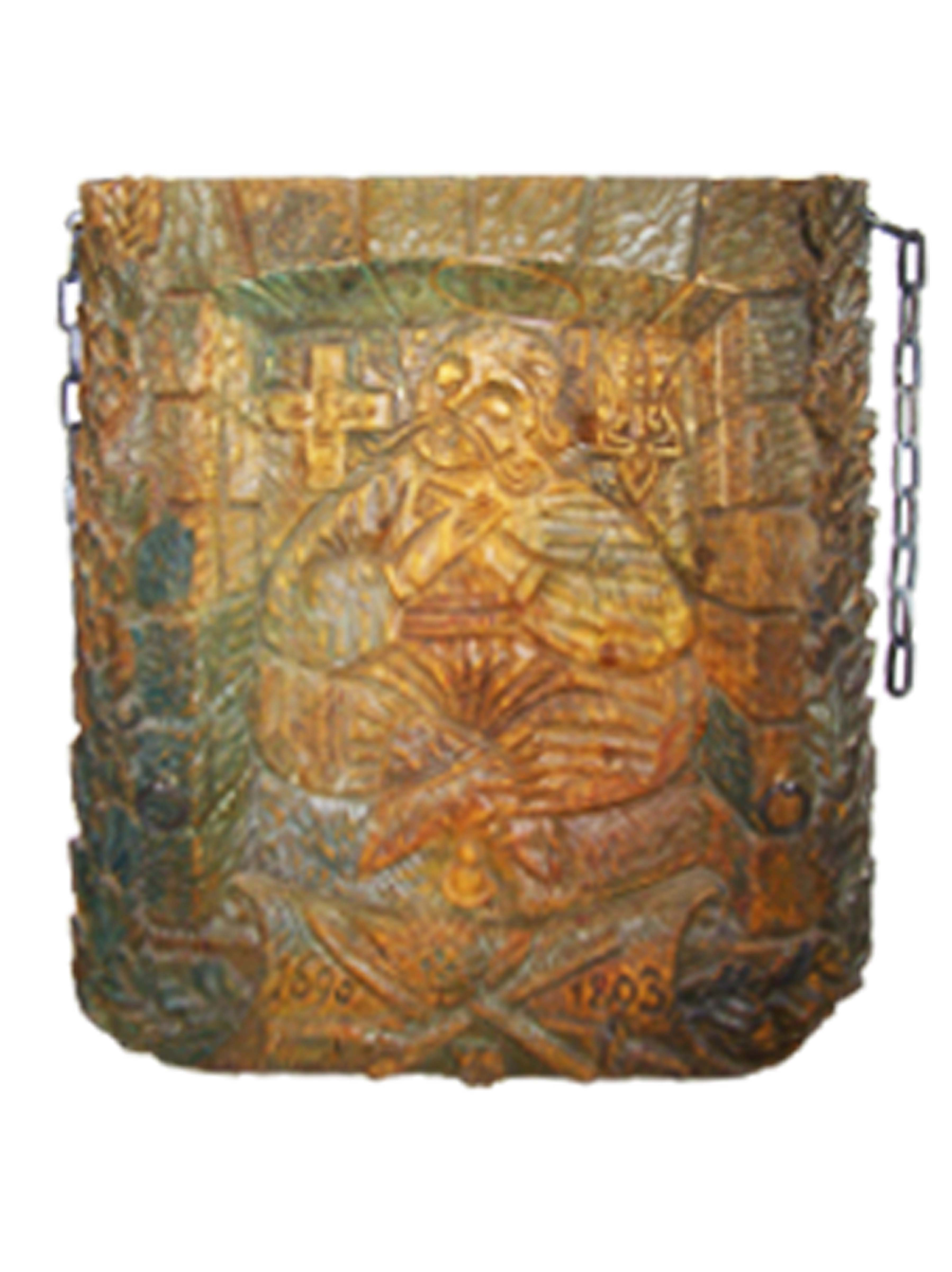 (дерево, художнє різблення)